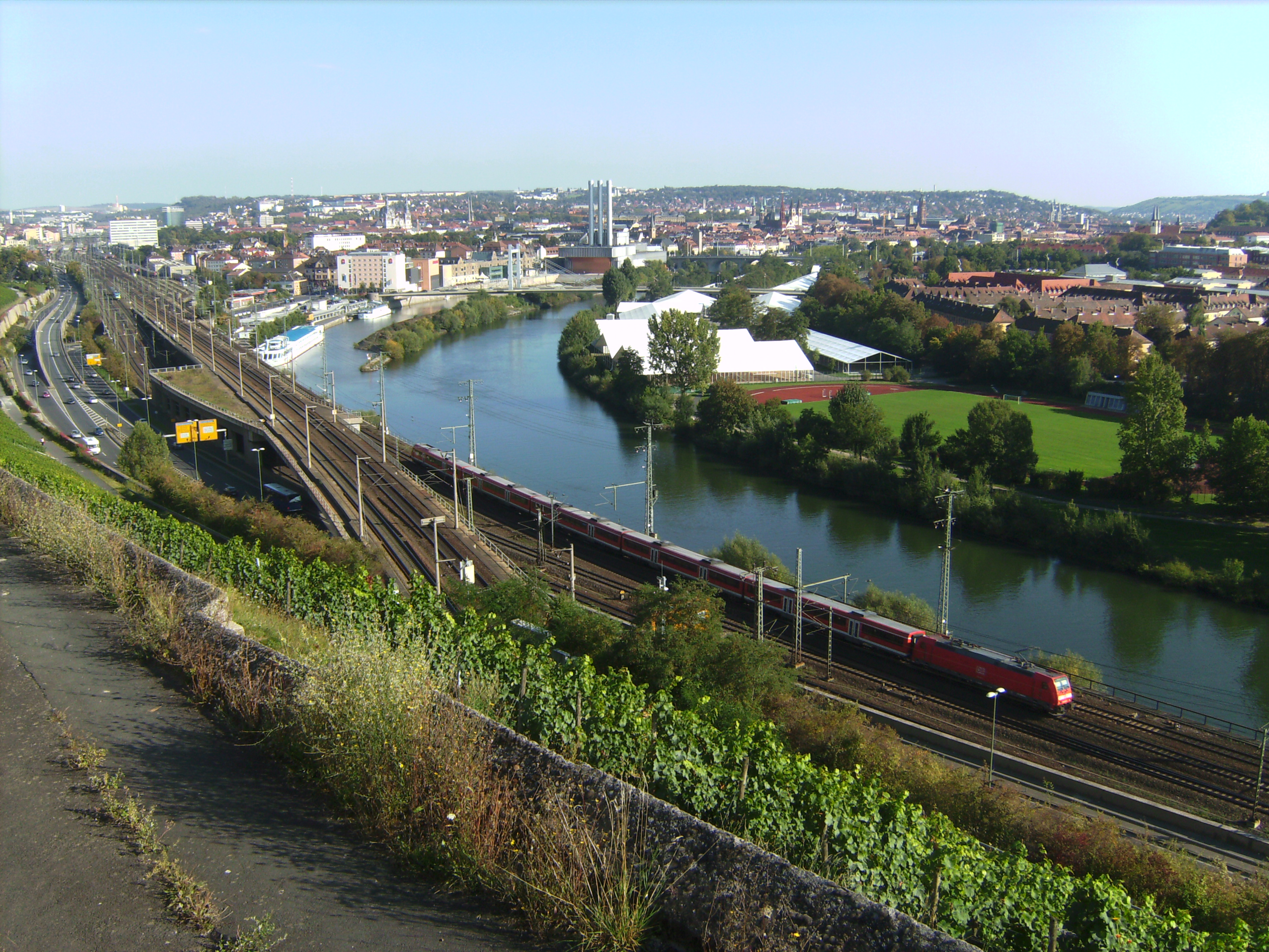 Blick über die Stadt Würzburg, im Vordergrund fährt ein Regional-Express (mit Modus-Wagen) aus Frankfurt (Main) auf den Hauptbahnhof zu. Im Vordergrund mittig ist die in den Steinbergtunnel einführende Rampe der Neubaustrecke Hannover–Würzburg zu sehen.